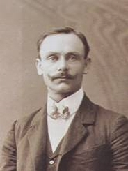 Roman Havelka (1877 - 1950), Český akademický malíř.